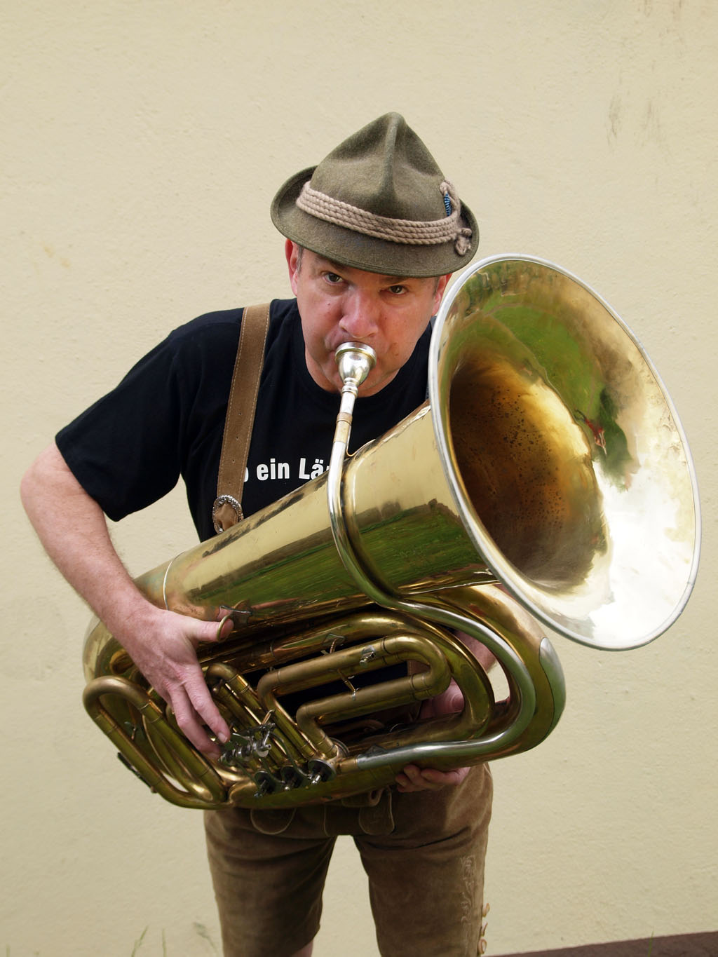 Fränkischer Kabarettist und Mundart-Autor Fredi Breunig mit Tuba.